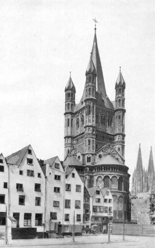 Groß-Sankt-Martin um 1925